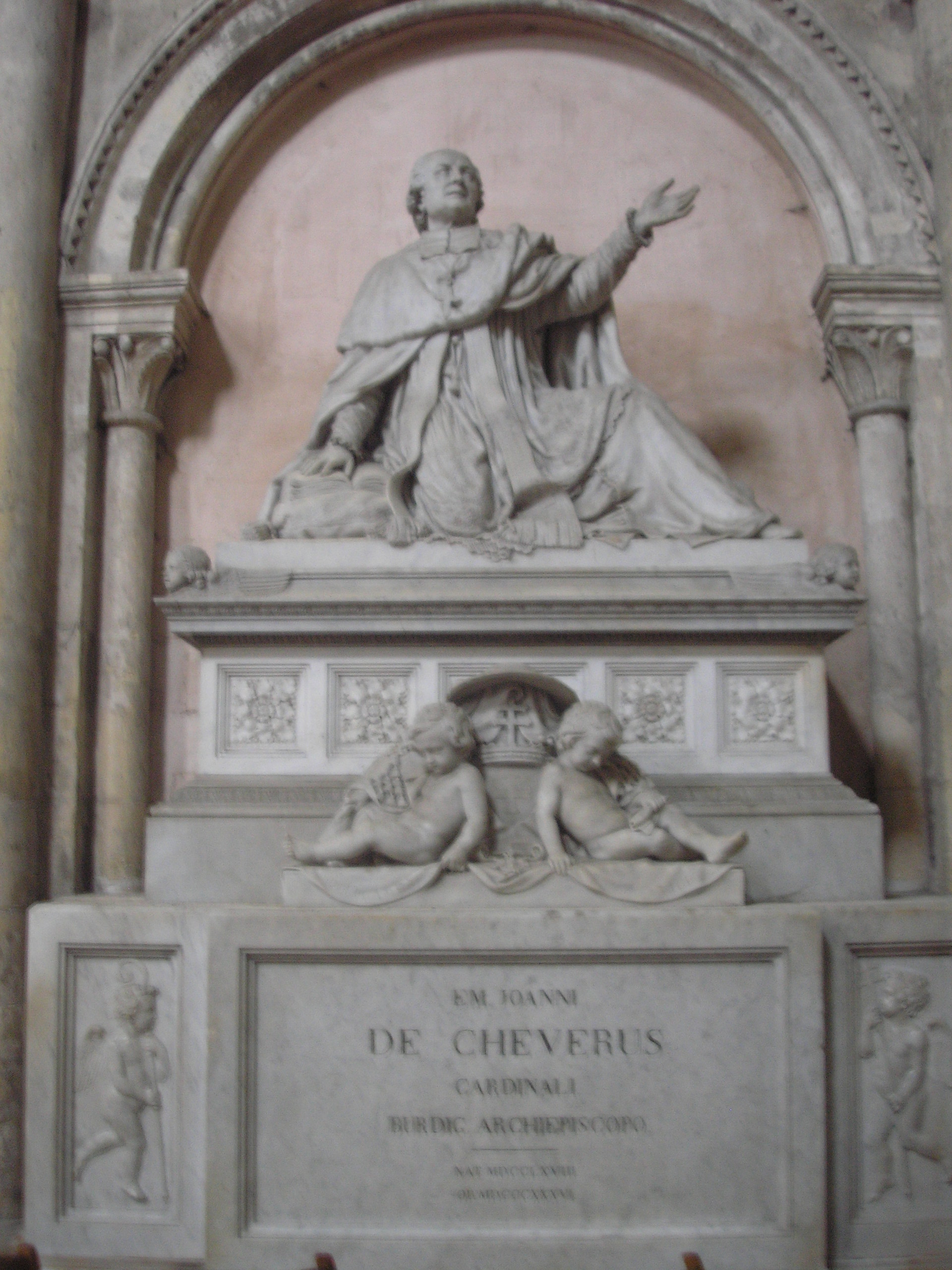 Tombeau du Cardinal Jean de Cheverus (archevêque de Bordeaux de 1826 à 1836), dans la cathédrale Saint-André de Bordeaux.